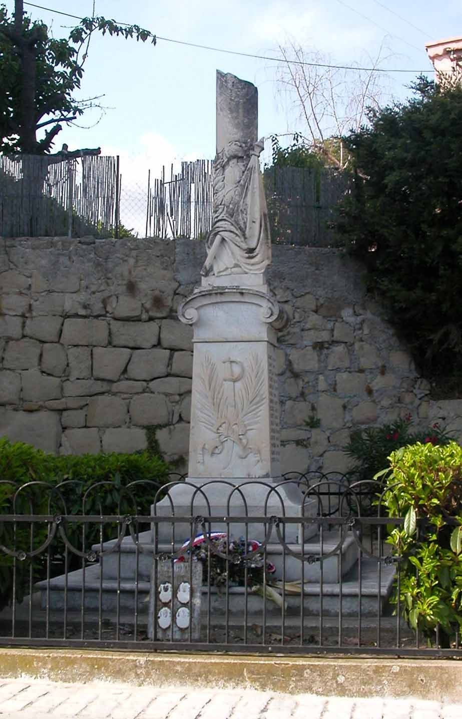 Monument aux Morts - Avenue Alfred Borriglione, 06 Berre-les-Alpes